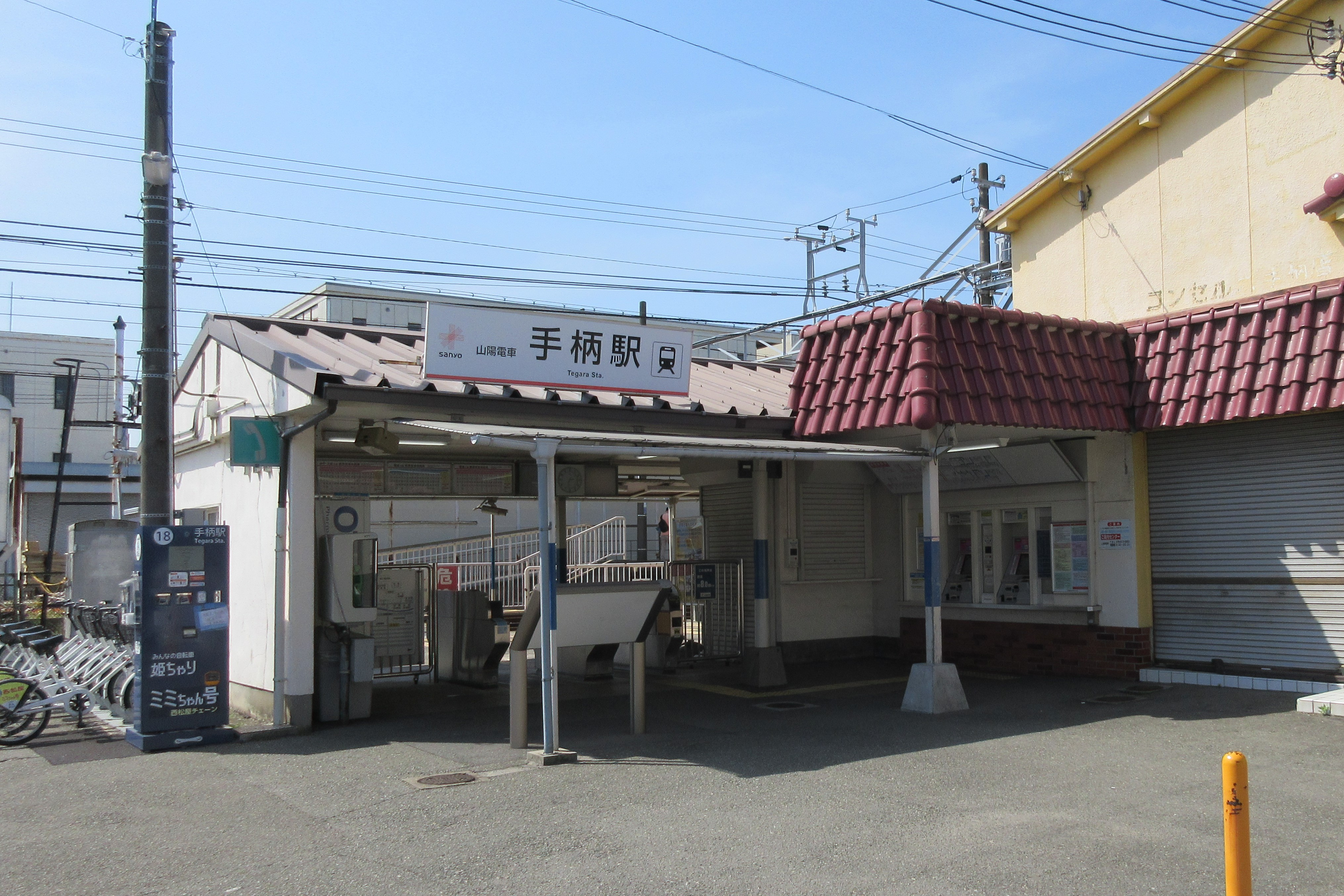 山陽電鉄手柄駅